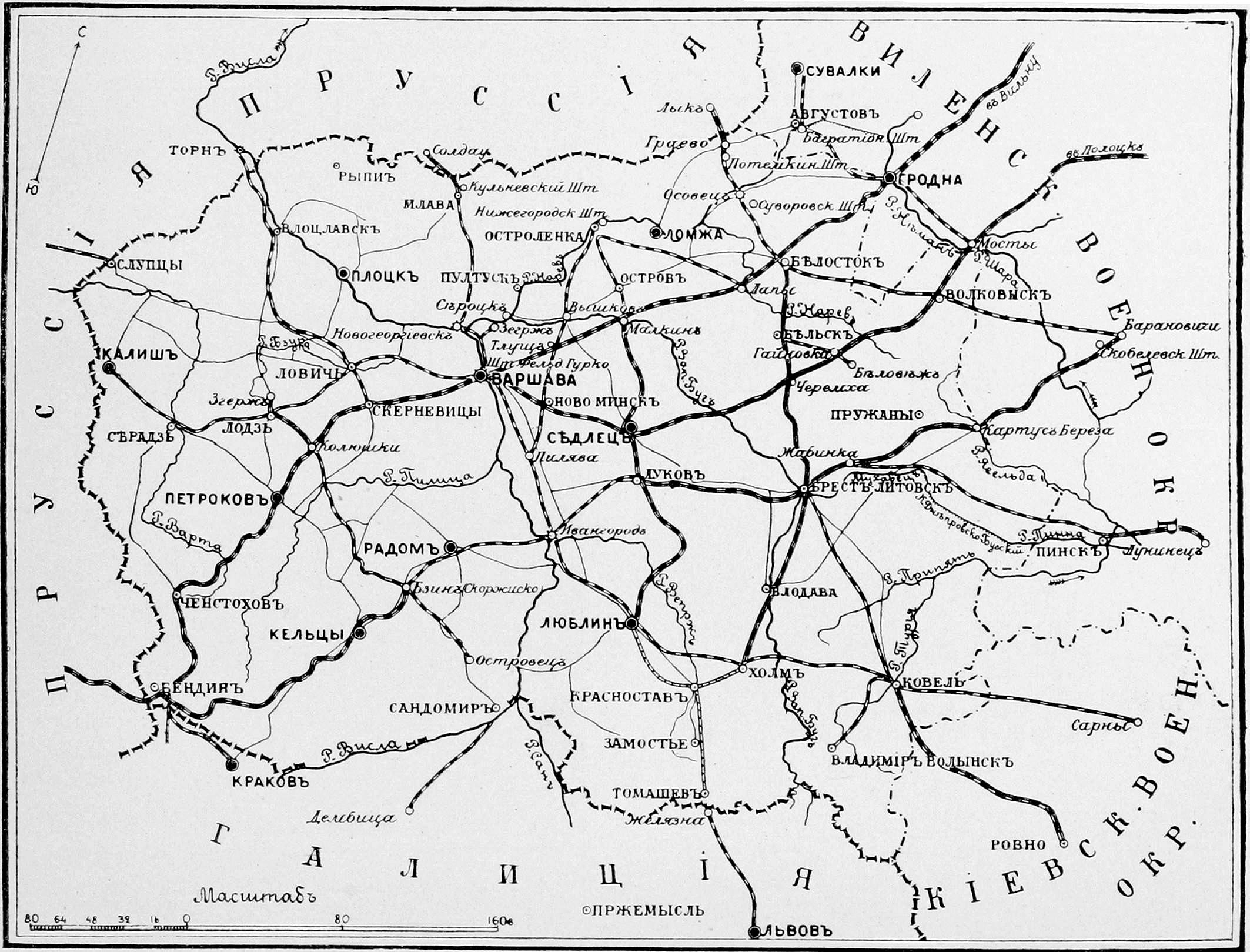 Варшавский военный округ. Данное изображение было использовано в статье «Варшава» опубликованной в пятом томе «Военной энциклопедии», который был издан книгоиздательским товариществом Ивана Дмитриевича Сытина в 1911 году в столице Российской империи городе Санкт-Петербурге.